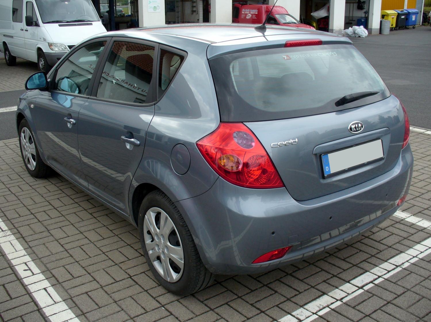 Kia cee'd